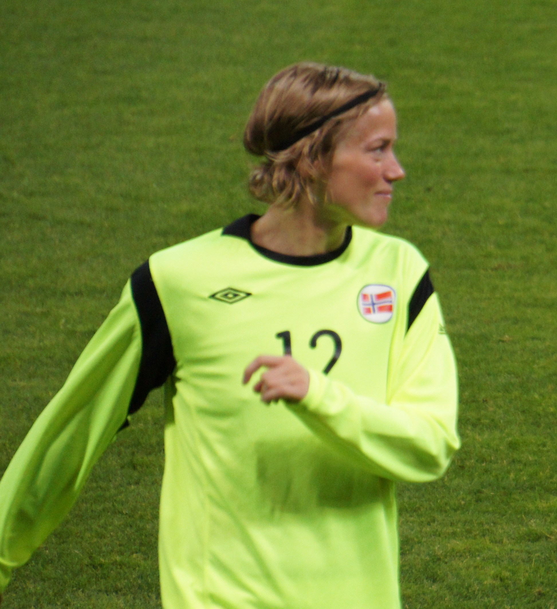 Silje Vesterbekkmo En équipe de Norvège.